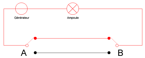 Schéma électrique d'un va et vient avec ampoule allumée.